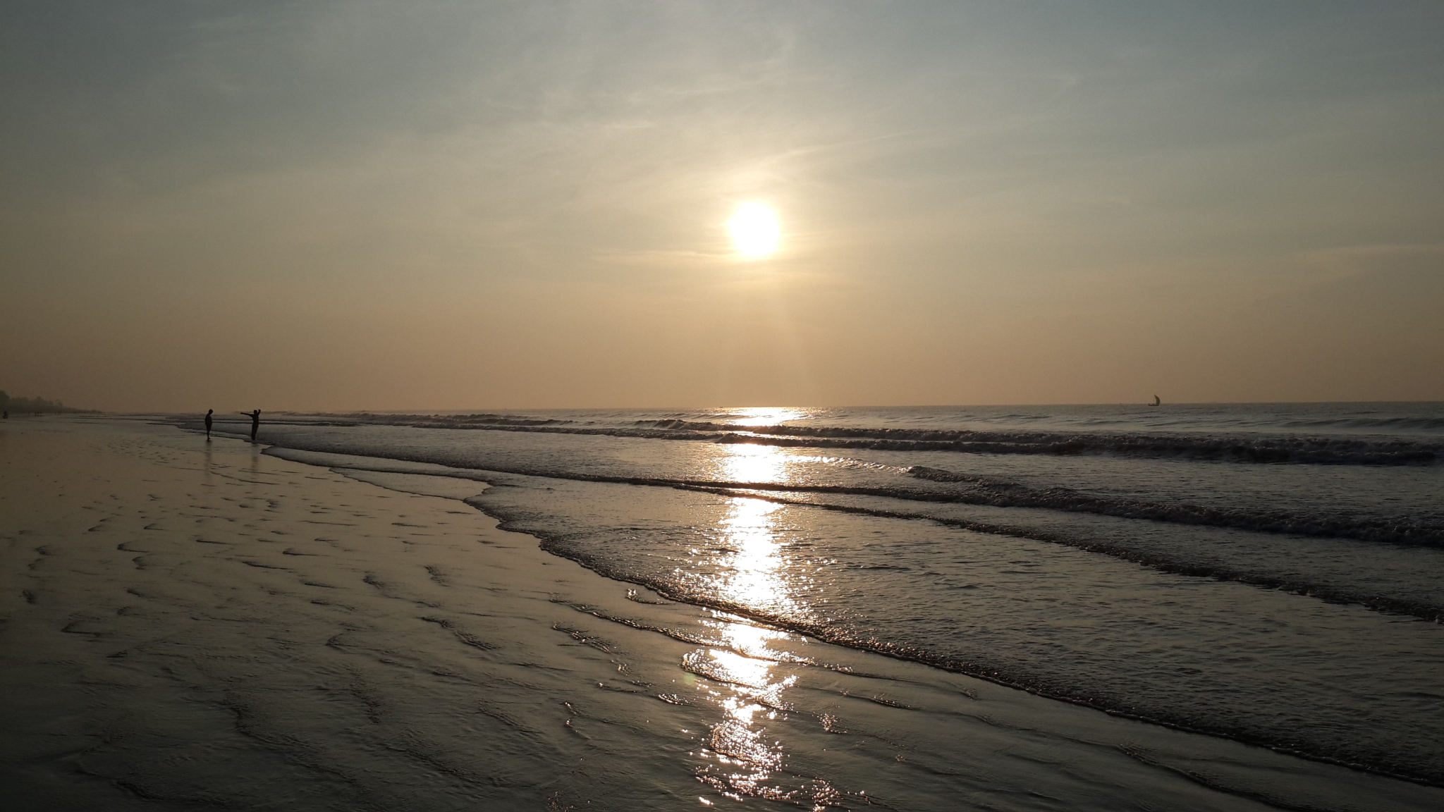 চোখ মেললেই ছবি